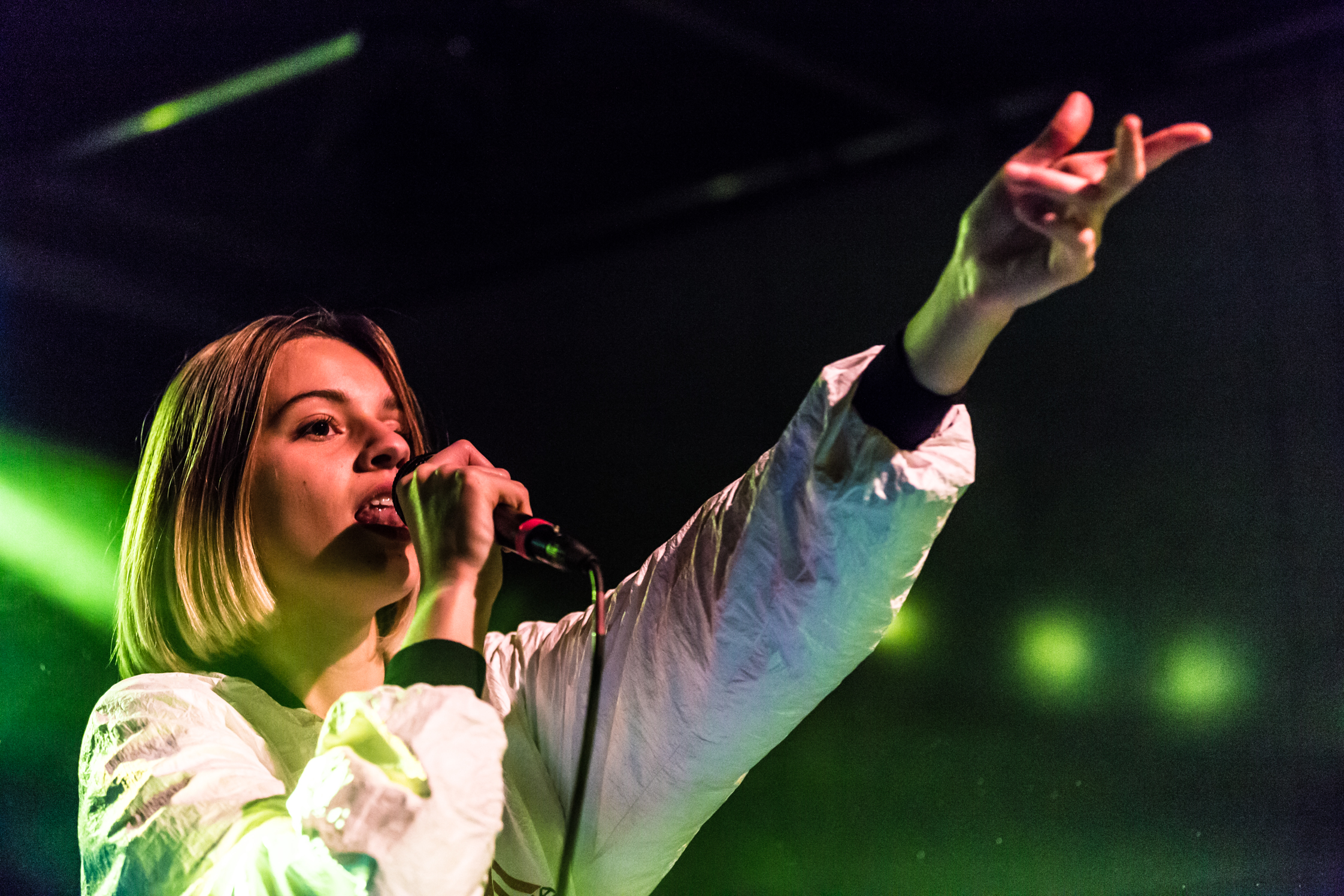 Mavi Phoenix live am Crossing Europe, Linz 2017